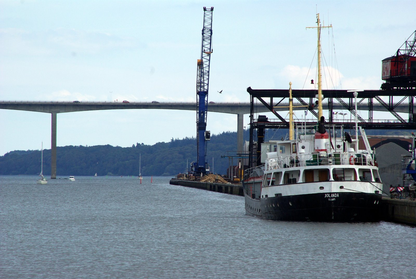 Vejle sadam ja sild